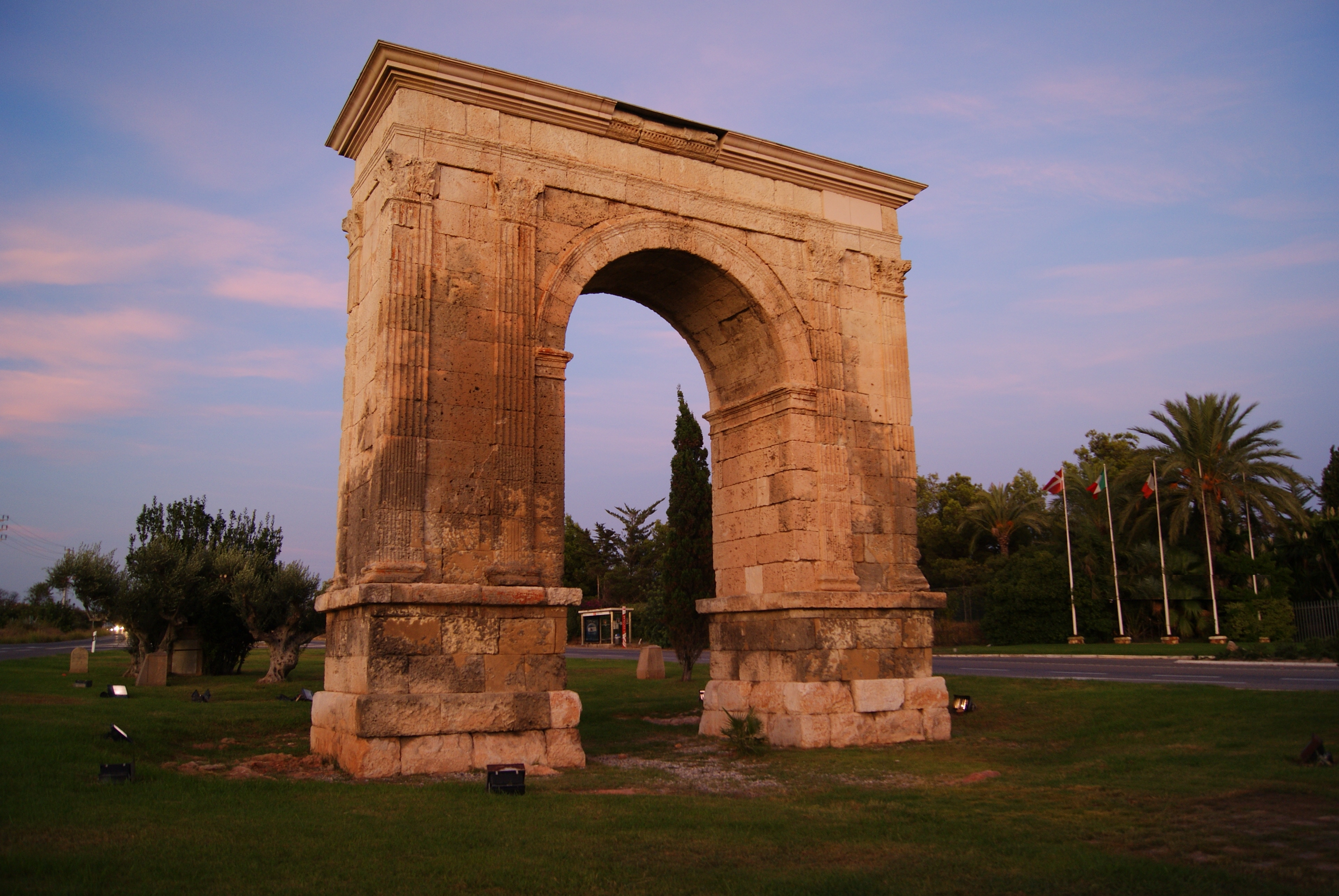 Arc de Berà (Roda de Barà)